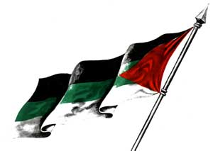 Great Arab Revolt flag